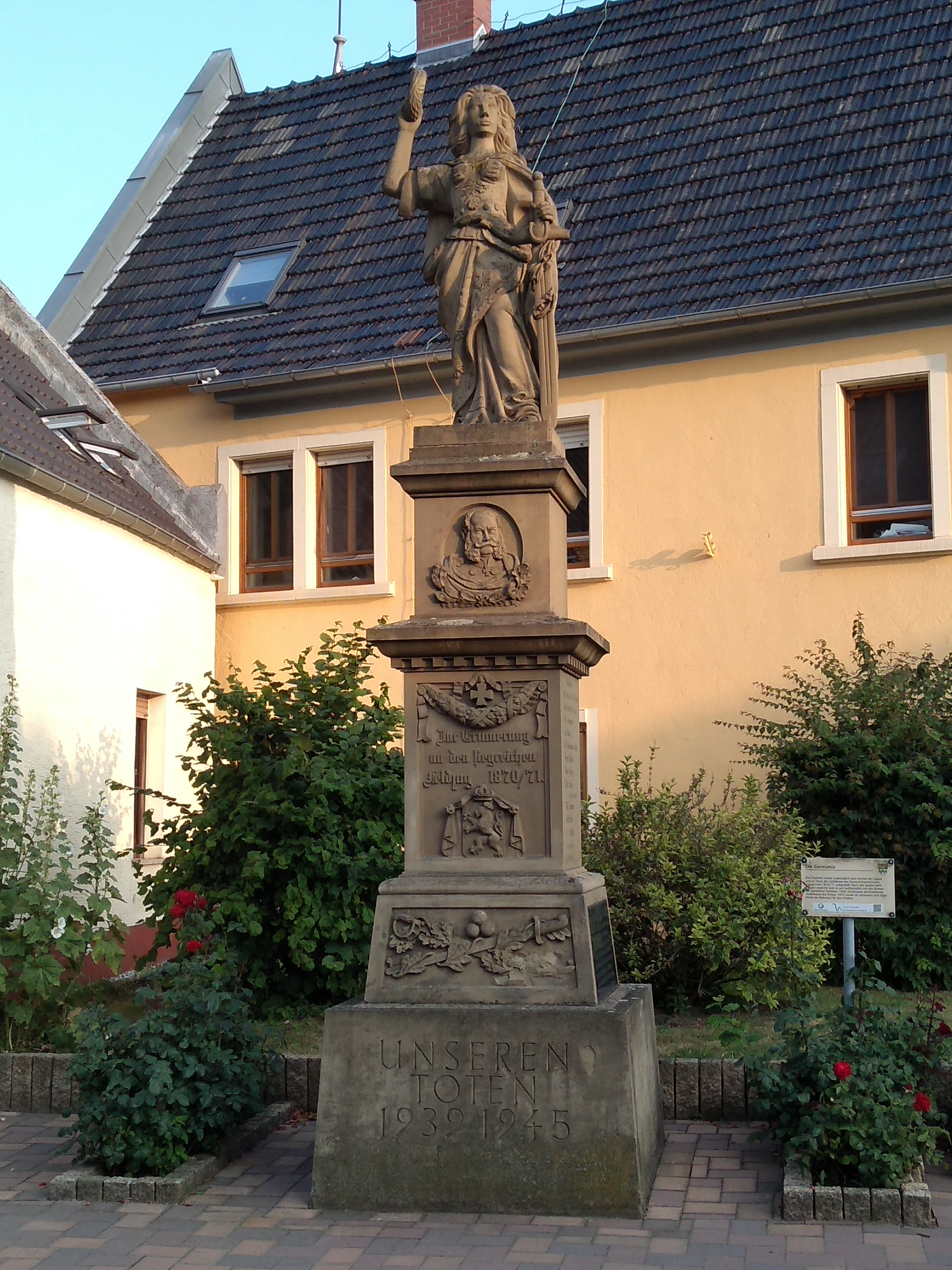 Kriegerdenkmal an der Langgasse 13 in Hochborn, Verbandsgemeinde Wonnegau, Landkreis Alzey-Worms, Rheinland-Pfalz, Deutschland. Kulturdenkmal gemäß Denkmalliste des Landes Rheinland-Pfalz (Stand: 31. Juli 2018). Stele auf nach 1945 hinzugefügtem Betonsockel, darauf stehend eine Steinskulptur der Germania. Auf der Vorderseite der Stele ein Relief von Kaiser Wilhelm I., darunter eine Inschrift "In Erinnerung an den siegreichen Feldzug 1870/71", auf dem Sockel "Unseren Toten 1939 1945". Seitlich Namen von Gefallenen als Gravur auf dem Stein sowie auf einer Plakette. Stele und Skulptur von 1882 gemäß Denkmalliste.